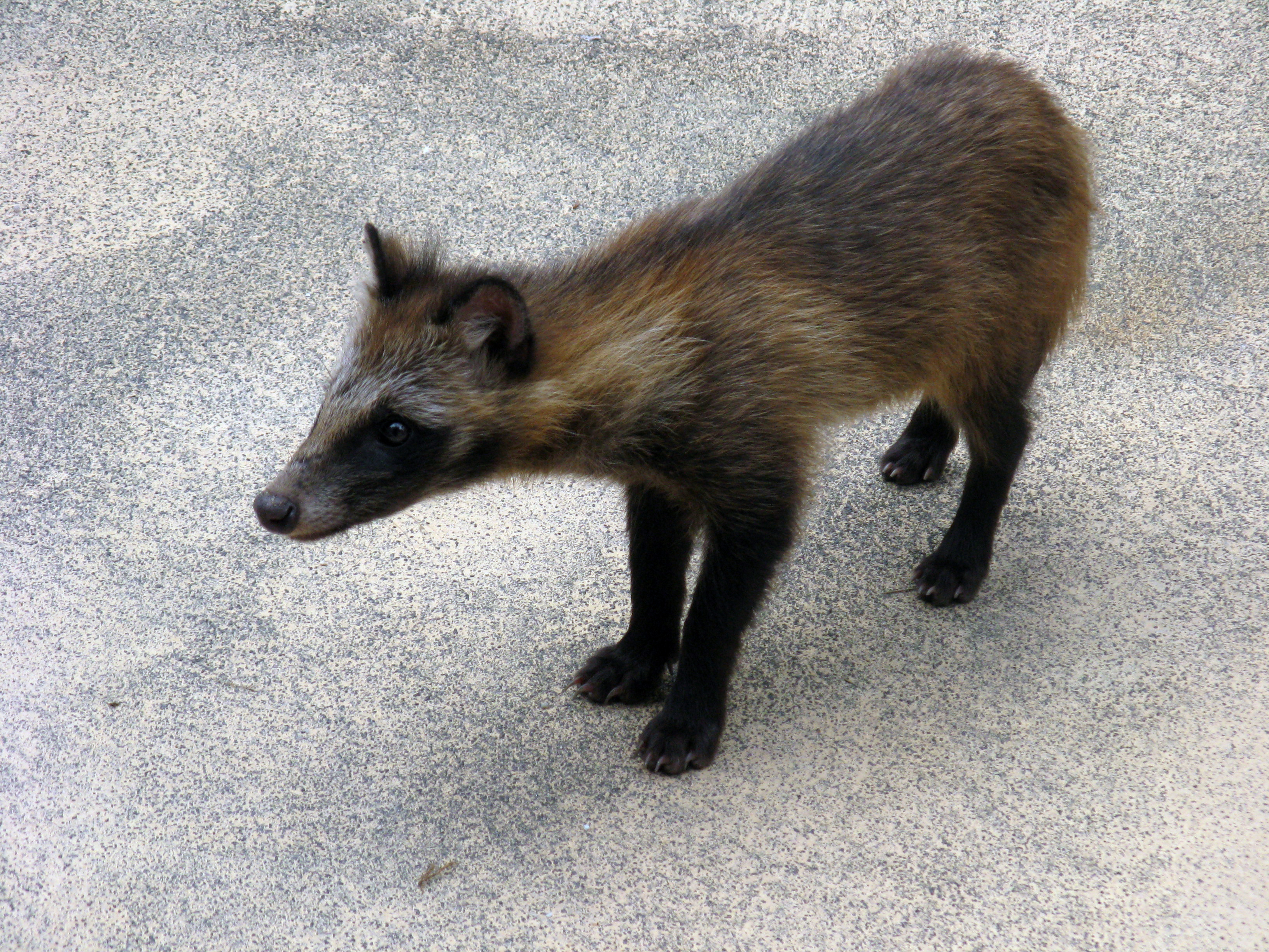 Nyctereutes procyonoides, juvenile, taken in Miyajima, Japan